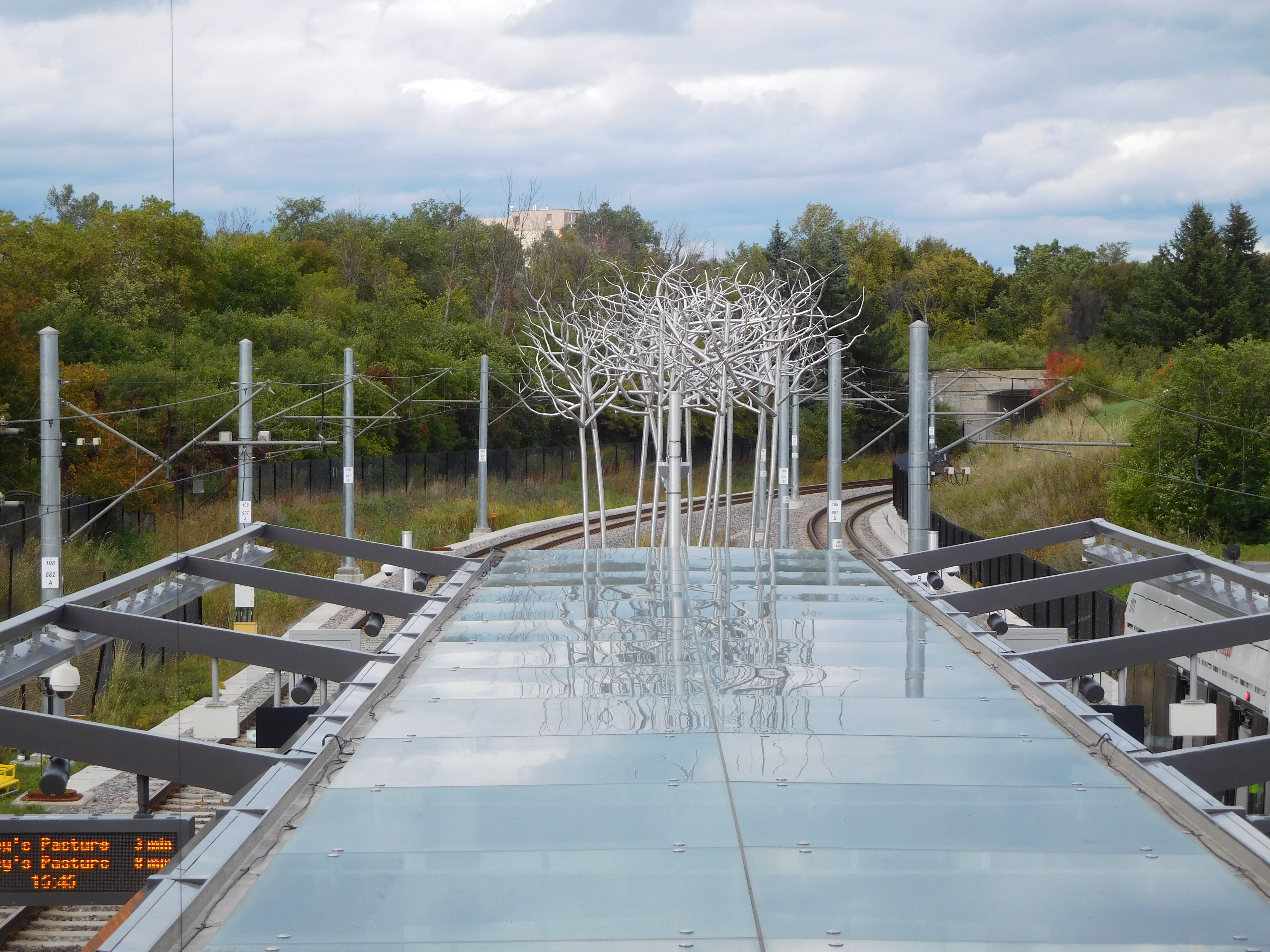 Œuvre de Don Maynard, intitulée « Peuplement de bouleaux » Station Cyrville de la ligne de la Confédération à Ottawa